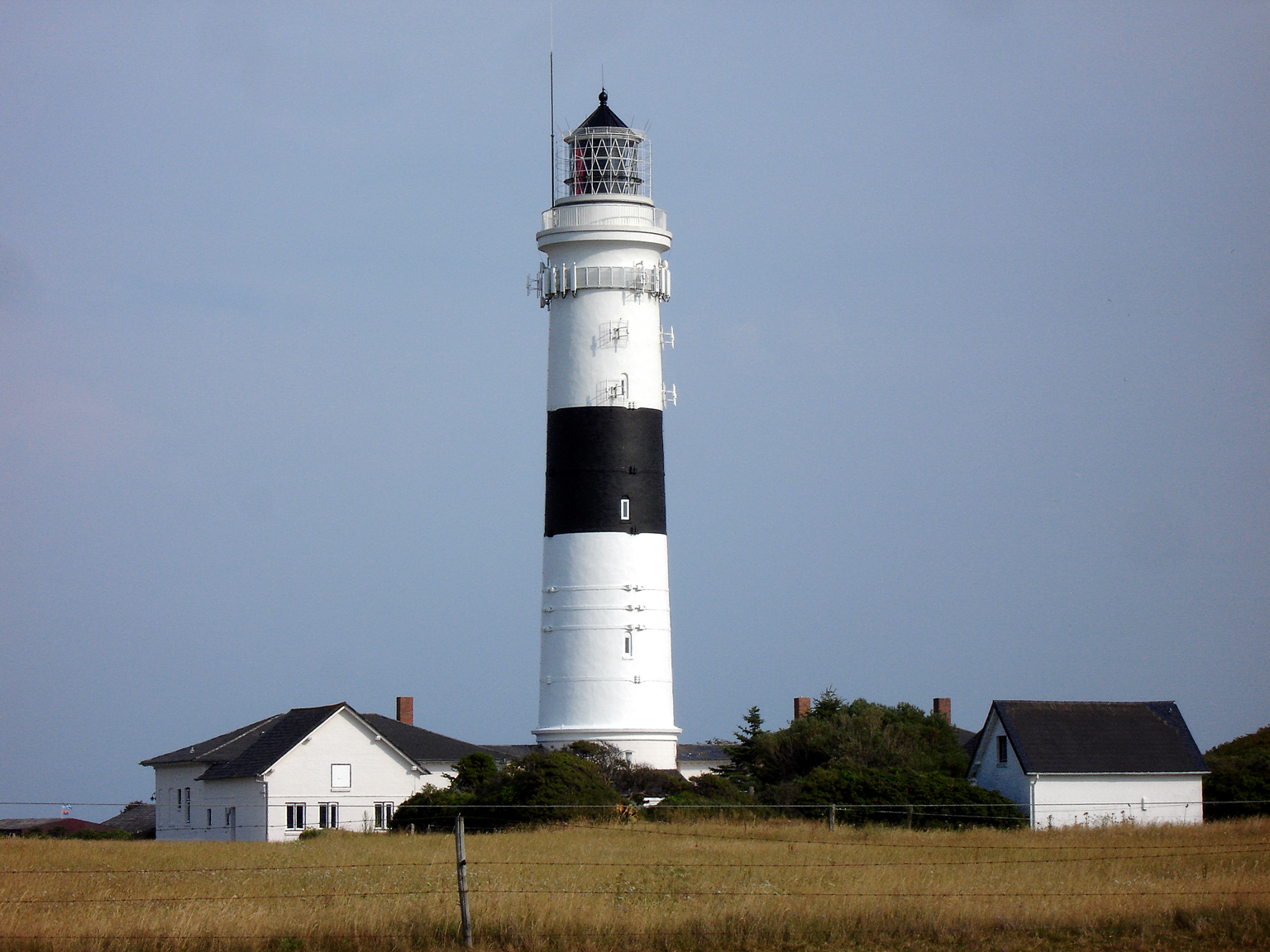 Leuchtturm in Kampen/Sylt/Germany